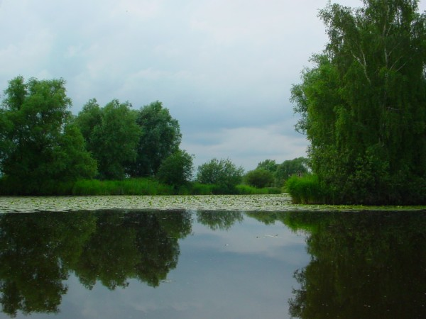 Naturschutzgebiet Gose Elbe